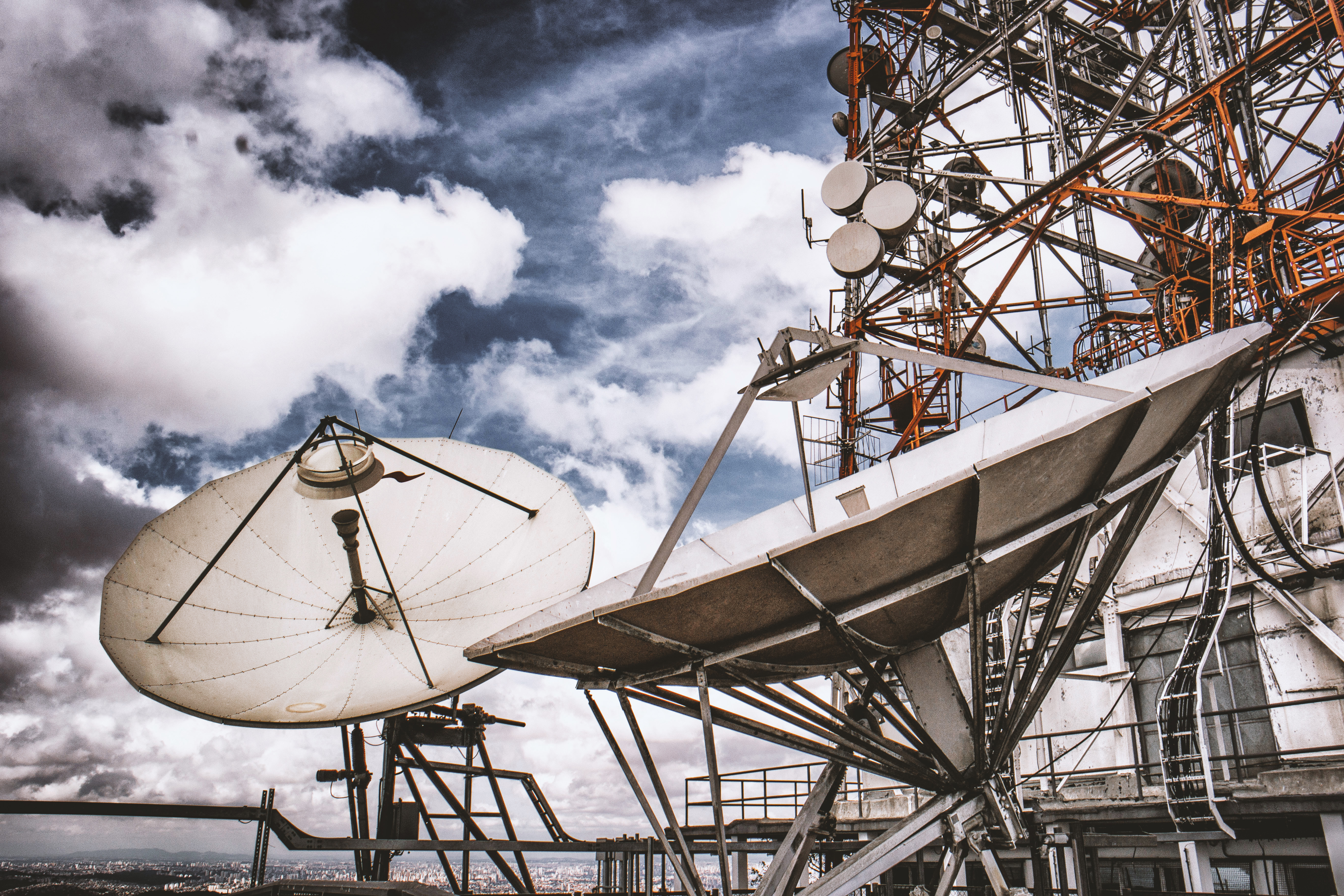 Antenas invadem a área natural do parque.